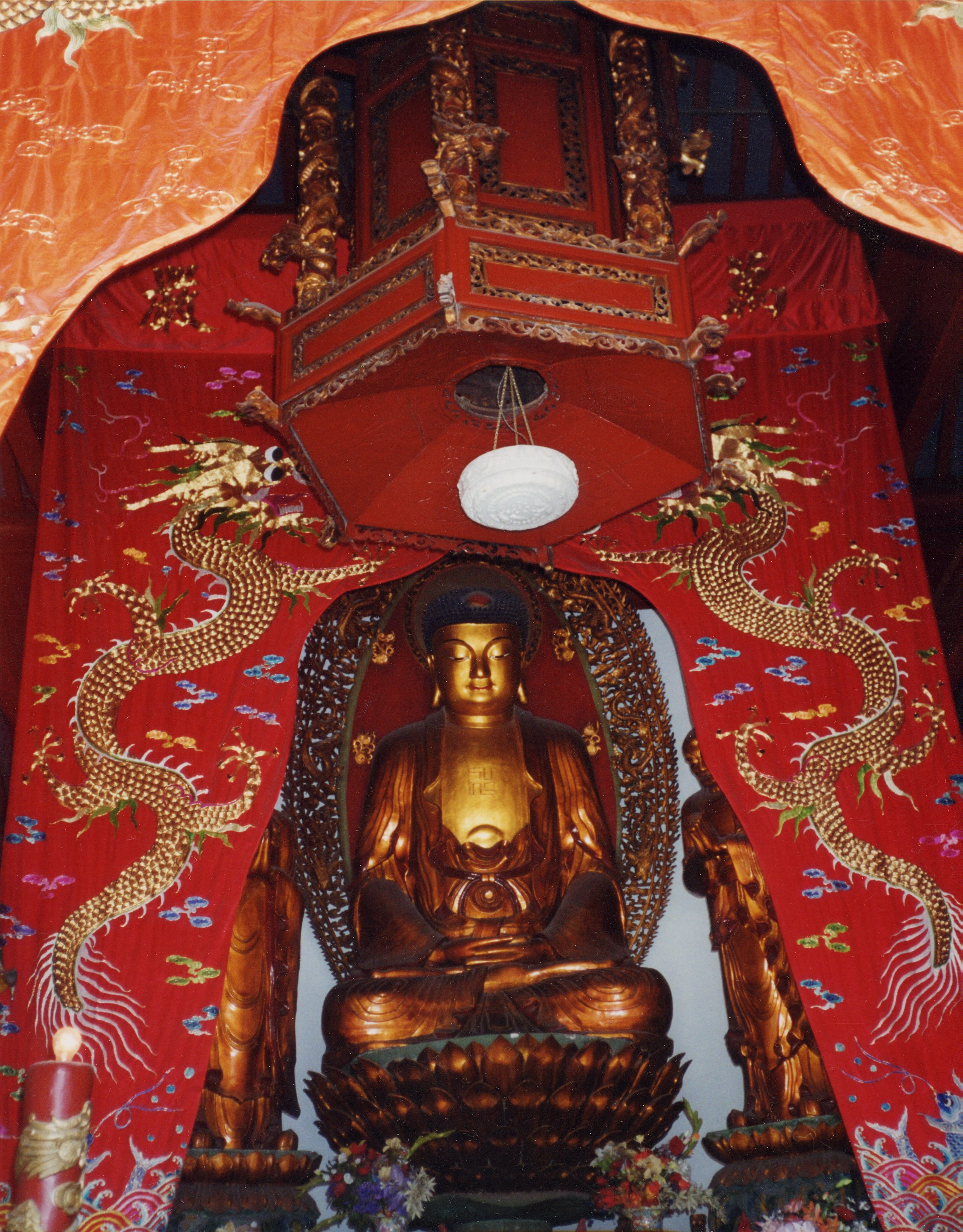 寒山寺大雄宝殿釈迦如来像